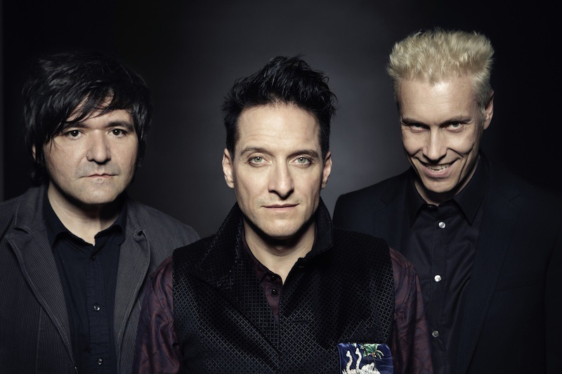 Die Band Die Ärzte. Von links nach rechts: Rodrigo González, Bela B und Farin Urlaub